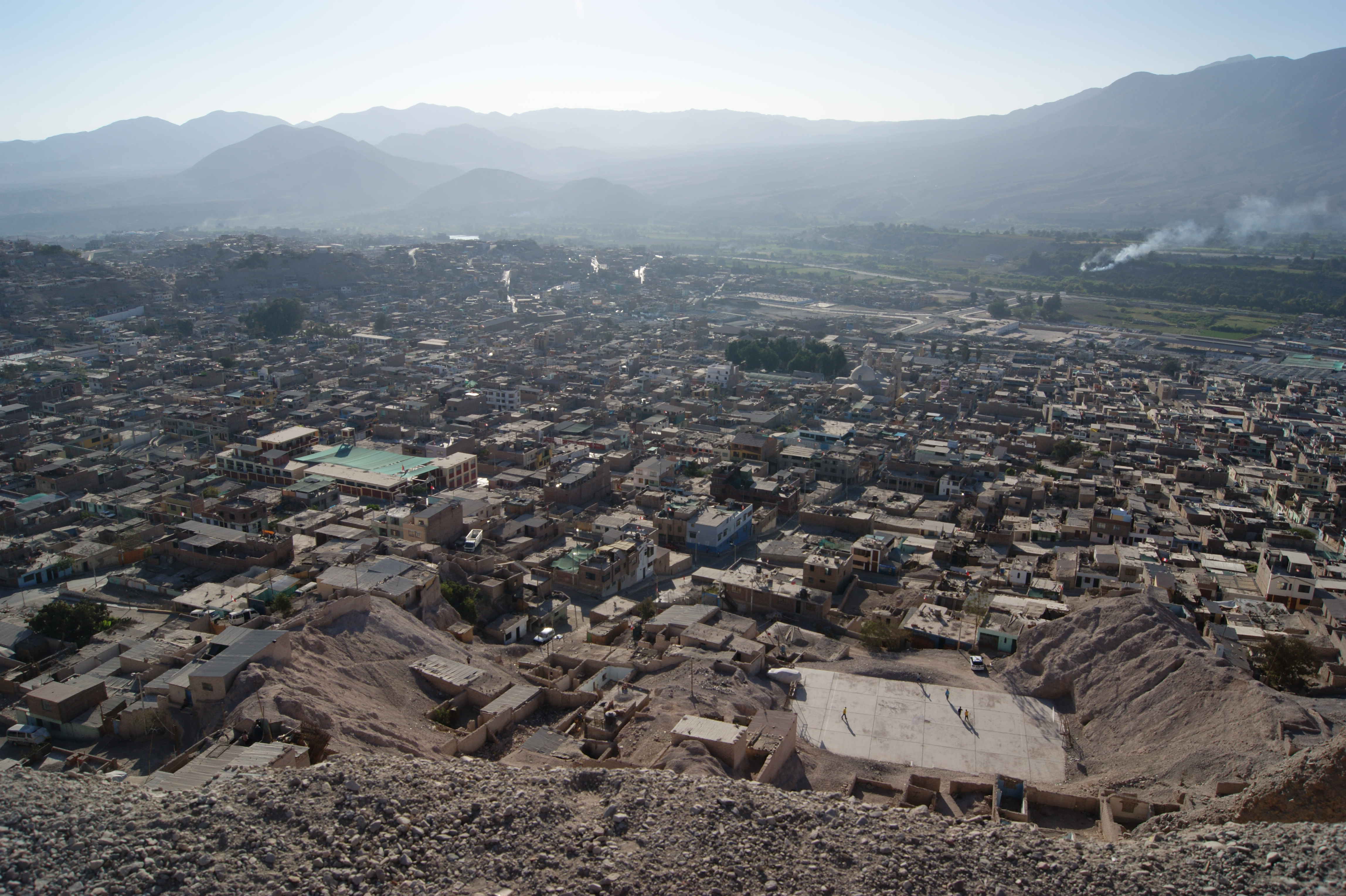 Vista de la ciudad de Moquegua. Moquegua, Perú.